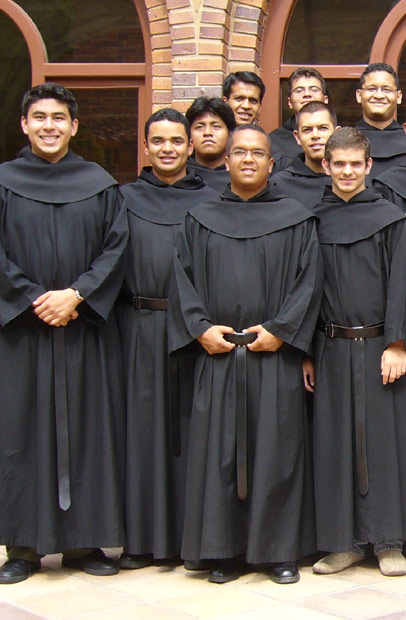 Jóvenes novicios de la Orden de Agustinos Recoletos. Monasterio de Marcilla, Navarra. España